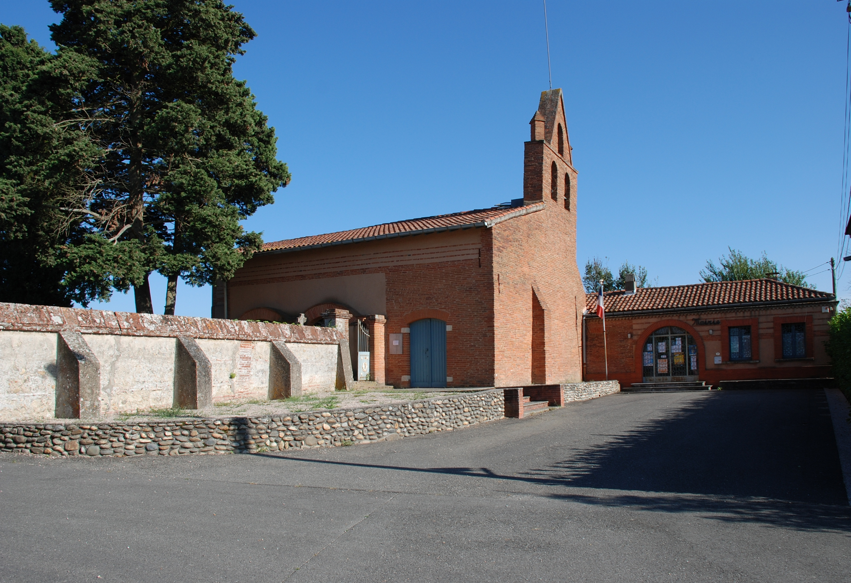 Église et mairie de Mervilla, petit village sur les côteaux au dessus de Castanet-Tolosan dans la Haute-Garonne (France).